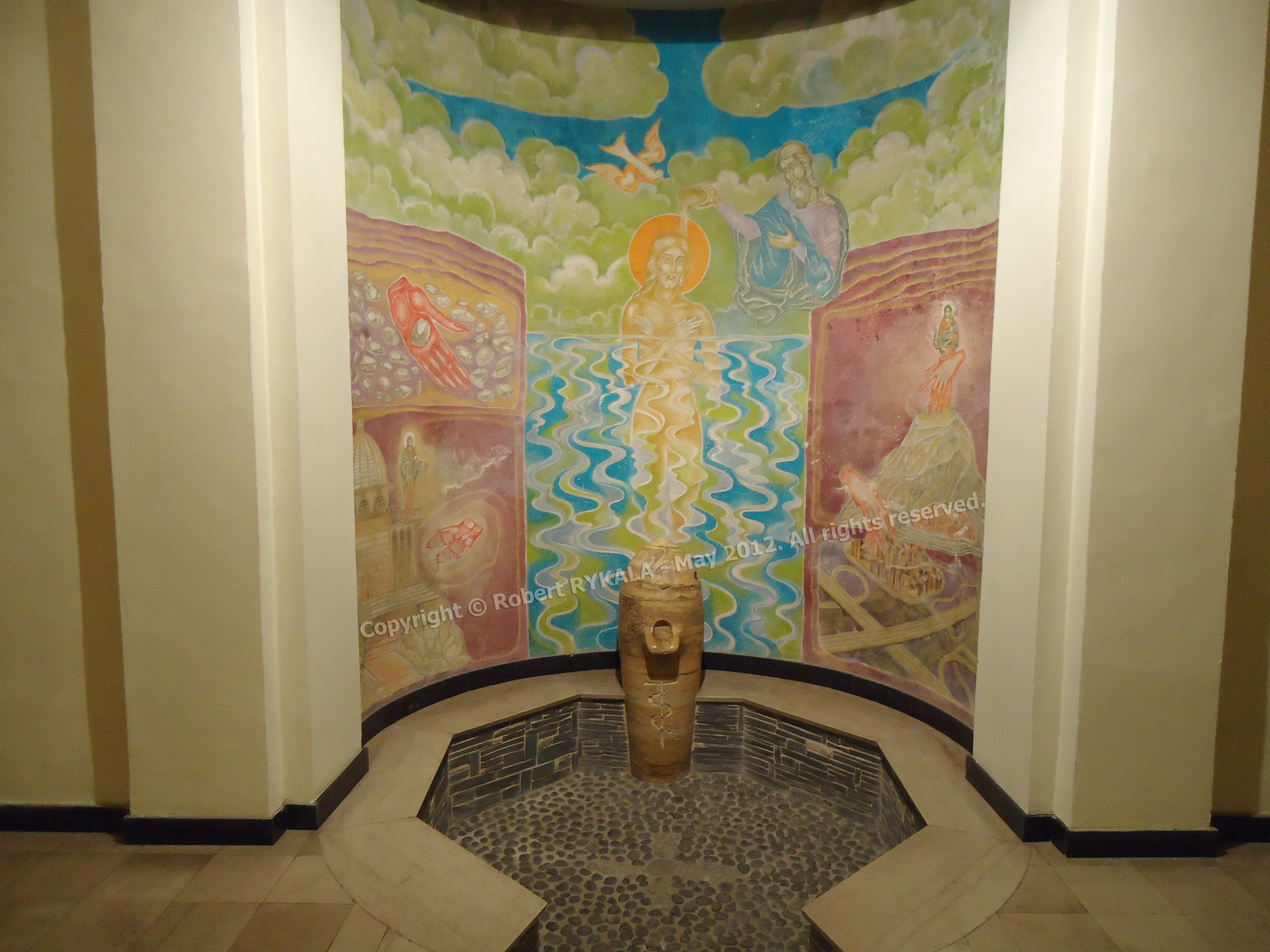 Les fonds baptismaux de l'église Saint Louis de Rouvroy .